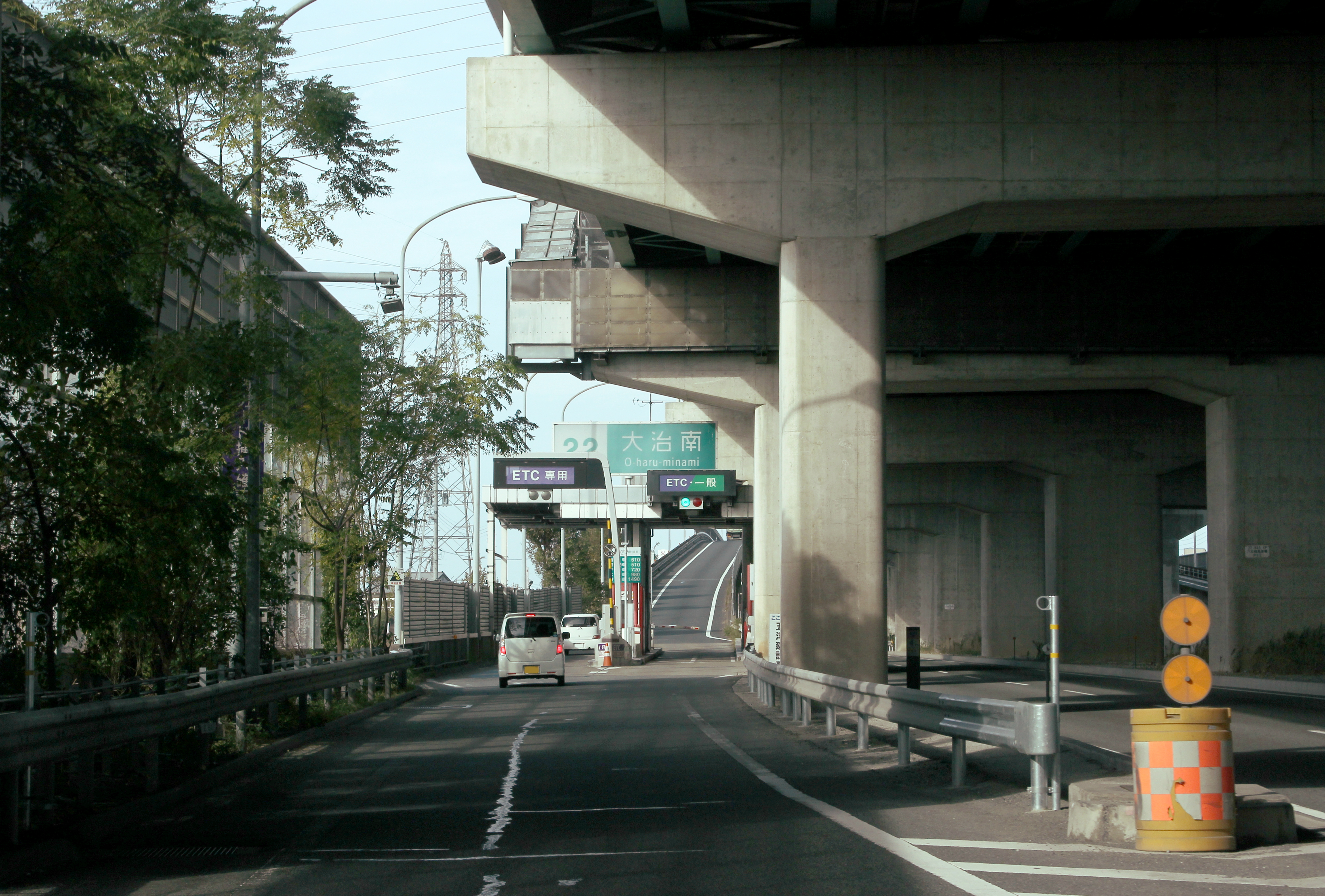 名二環 大治南IC